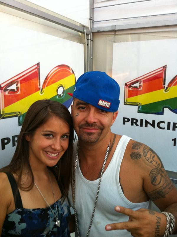 Cantantes Denise Rosenthal (izquierda) y DJ Méndez (derecha) en la fiesta World Dance Music de 40 Principales en Viña del Mar, Chile. Enero 2012.